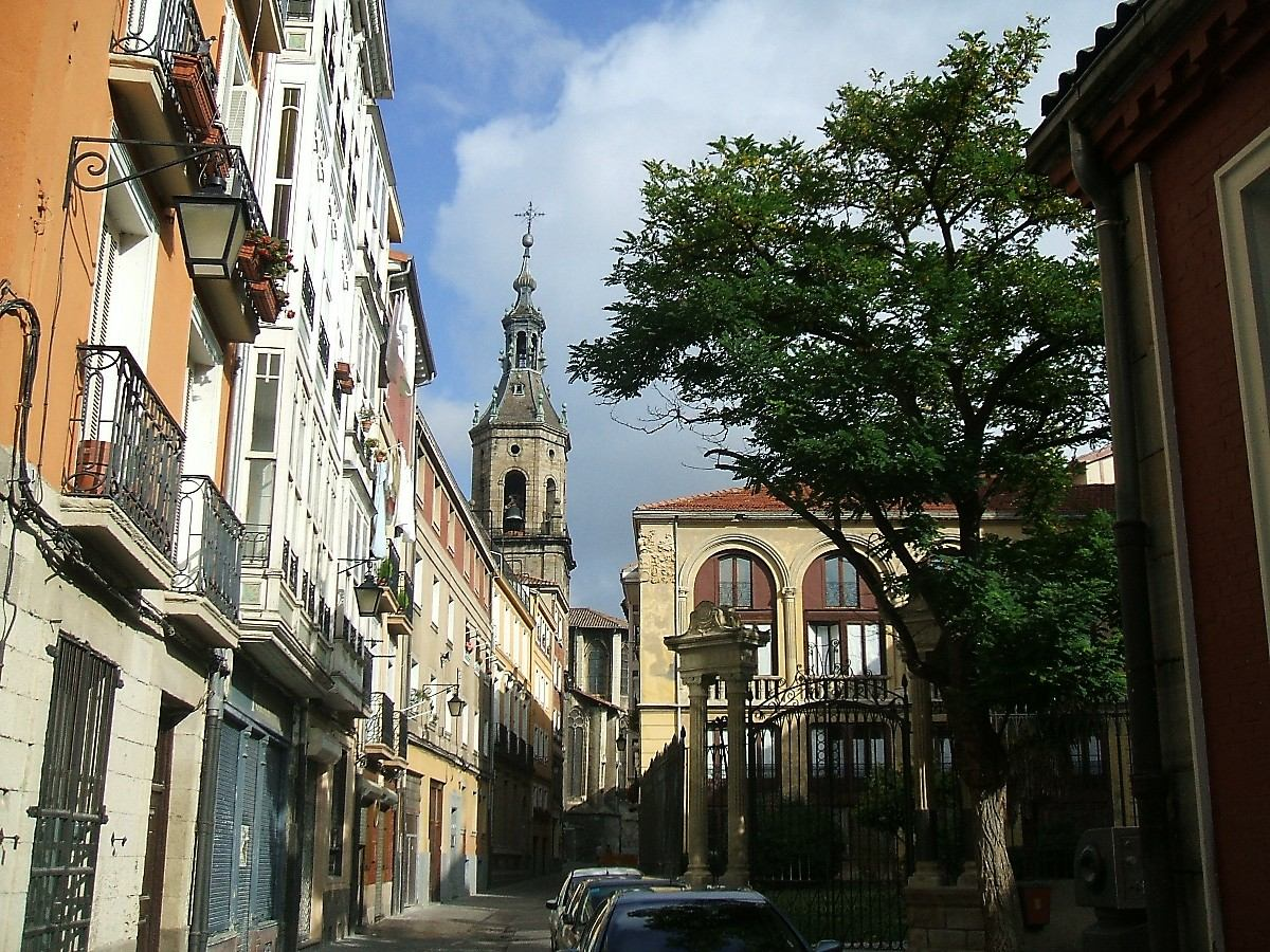 Calle Herrería, con la iglesia de San Pedro Apóstol al fondo, Vitoria-Gasteiz